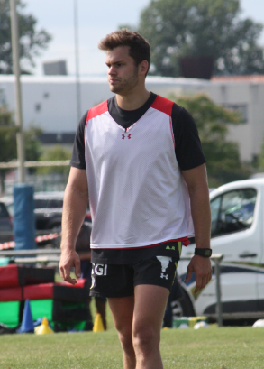 Asm Clermont